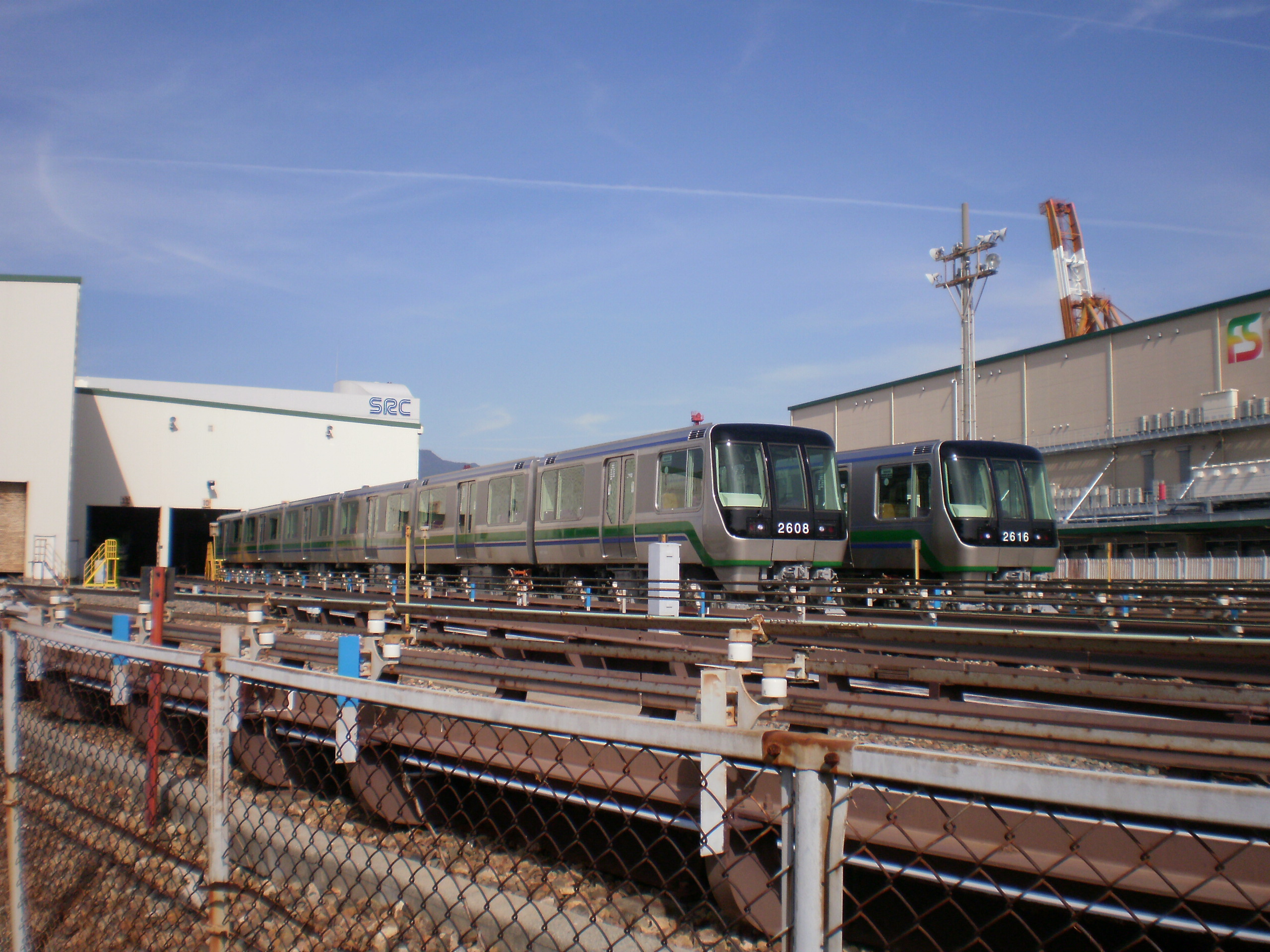 ポートライナーフェスティバル2012開催時の神戸新交通中埠頭車両基地